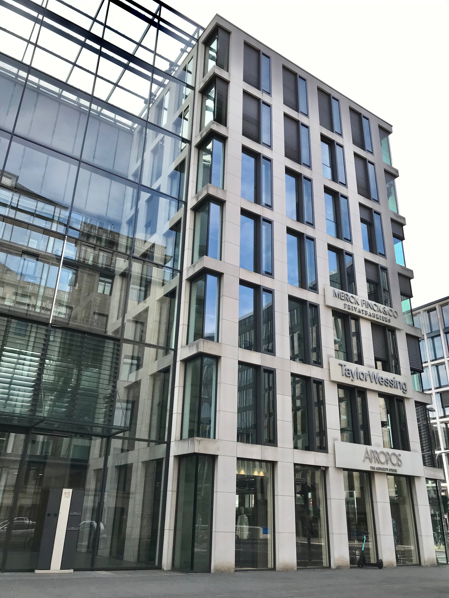 Merck Finck Gebäude in Düsseldorf